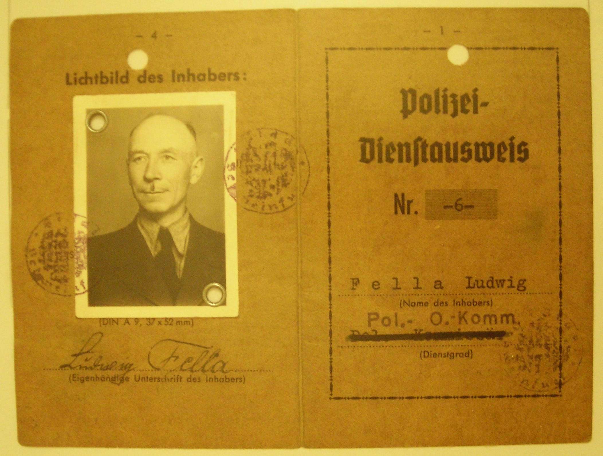 Polizei-Dienstausweis (historisch), Sonderausstellung "60 Jahre Bayerische Polizei" in Ingolstadt